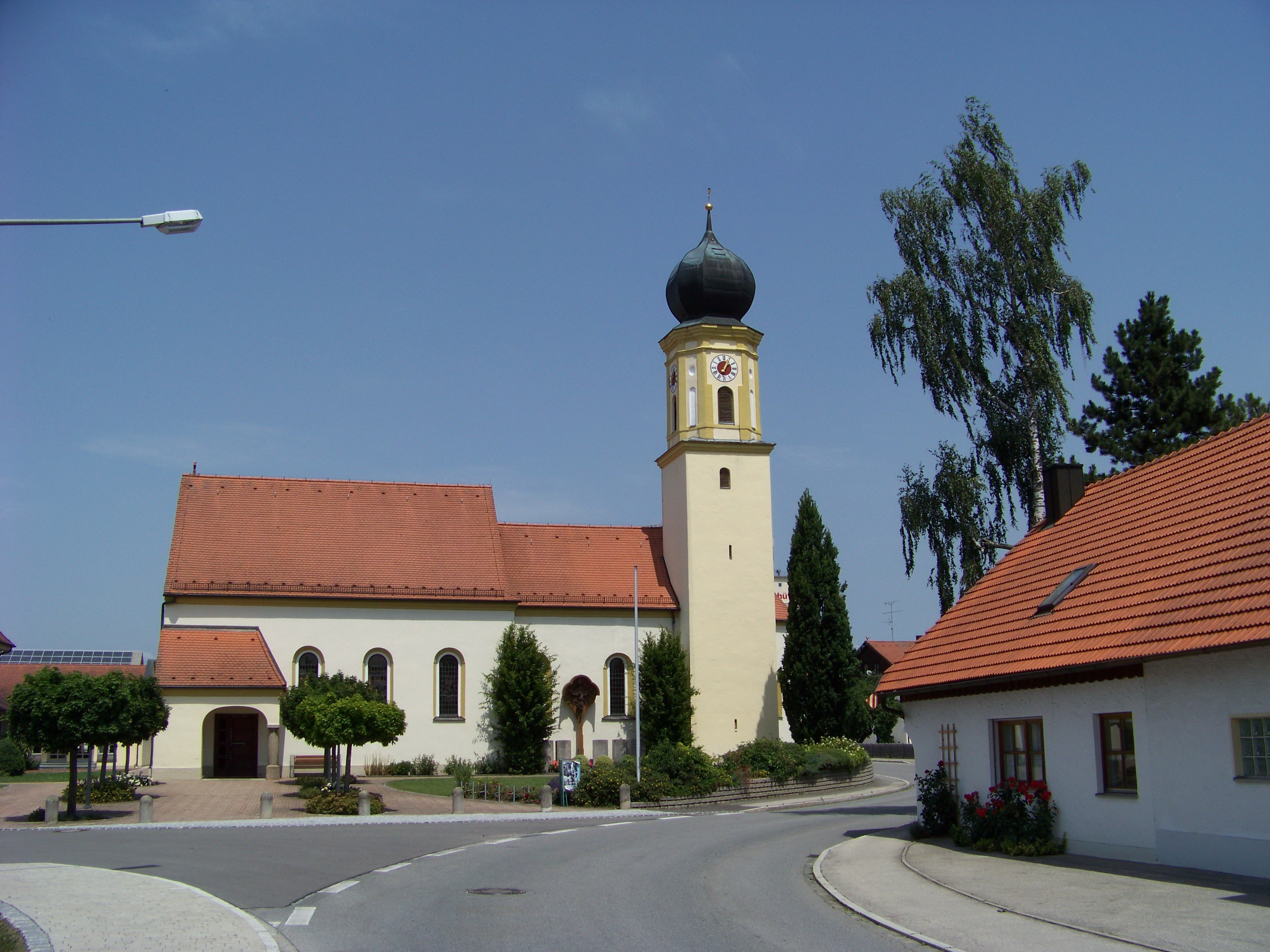 Salching, Brückenstraße 37, Katholische Filialkirche St. Petrus, kleine spätromanische Anlage, barock ausgebaut, um 1900 verändert, Turm 18. Jahrhundert; mit Ausstattung.